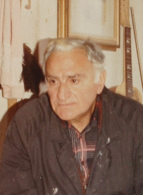 Ritratto di Ilario Rossi